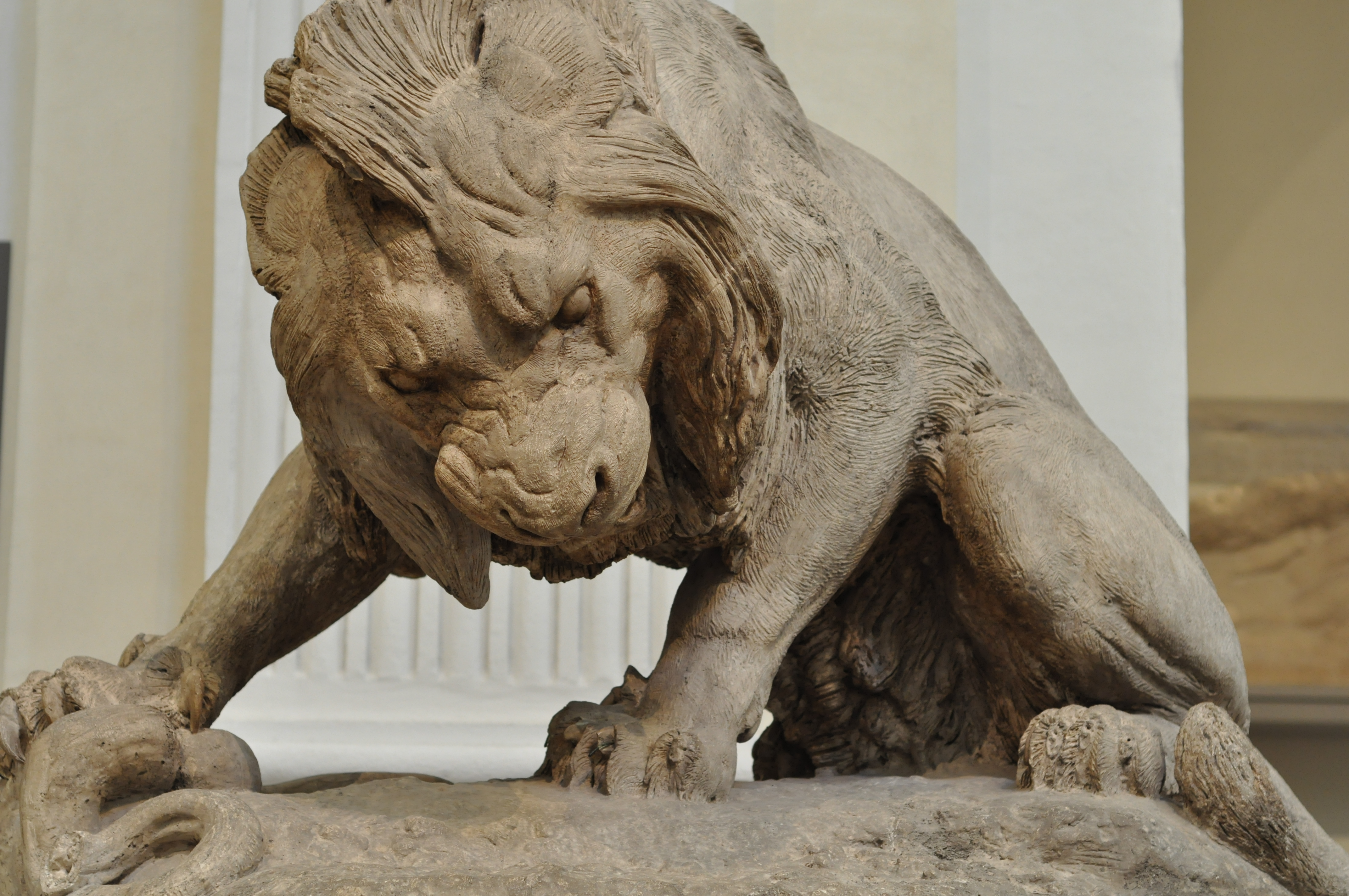 Lion au serpent, modèle en plâtre, département des sculptures, musée des beaux-arts de Lyon, France.